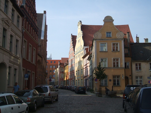 Stralsund,_Germany,_Fährstraße_(2006-09-29)